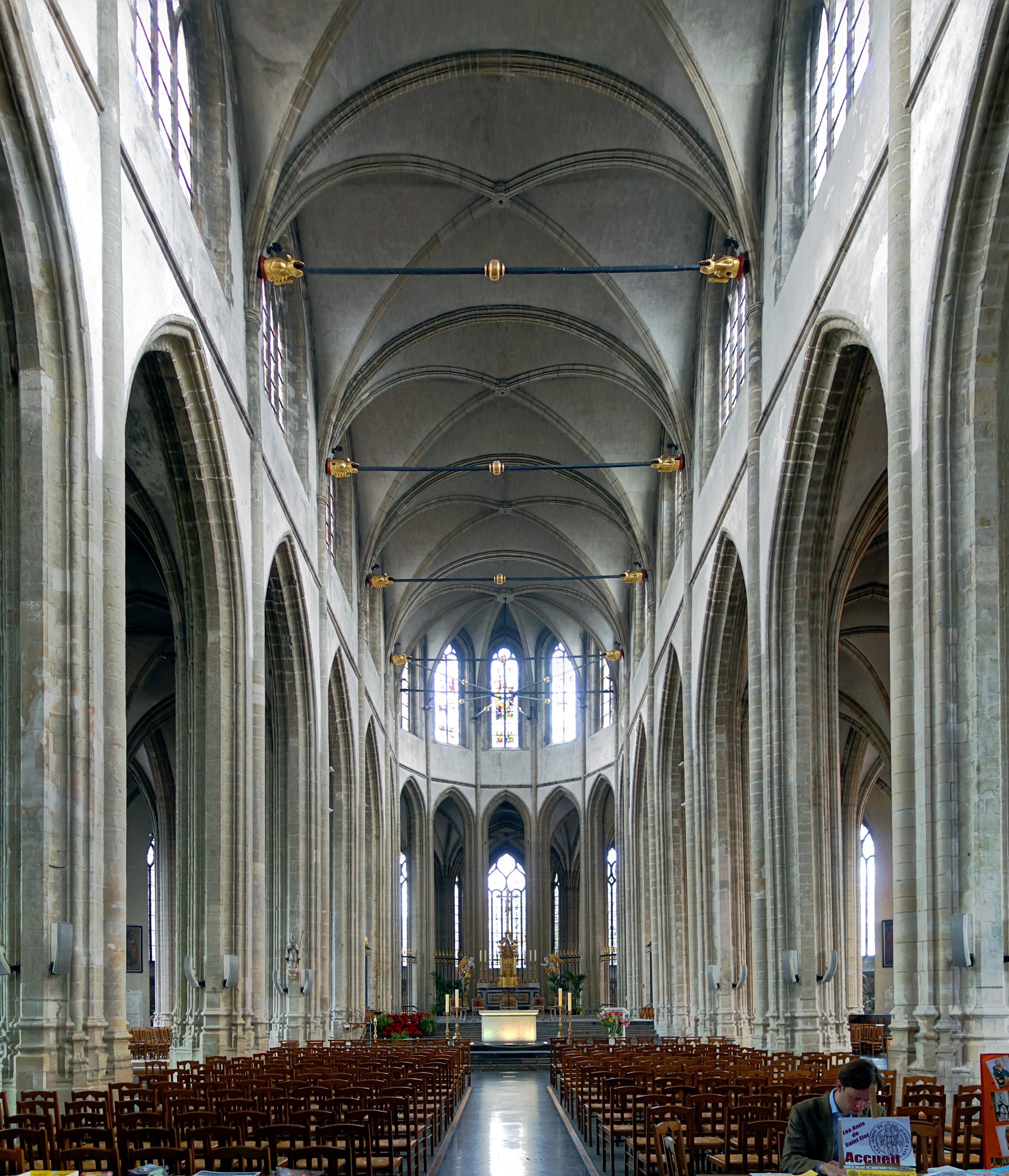 La nef centrale de l'église Saint-Éloi de Dunkerque.